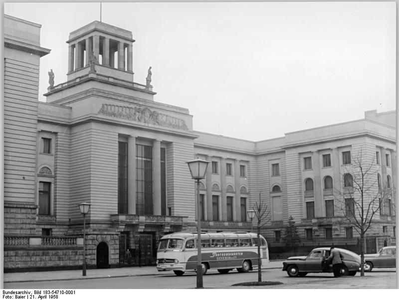 Berlin, Sowjetische Botschaft ADN-ZB Baier-Qua-Schm-21.4.1958 Berlin,Hauptstadt der DDR Die Botschaft der UdSSR in der Strasse Unter den Linden.